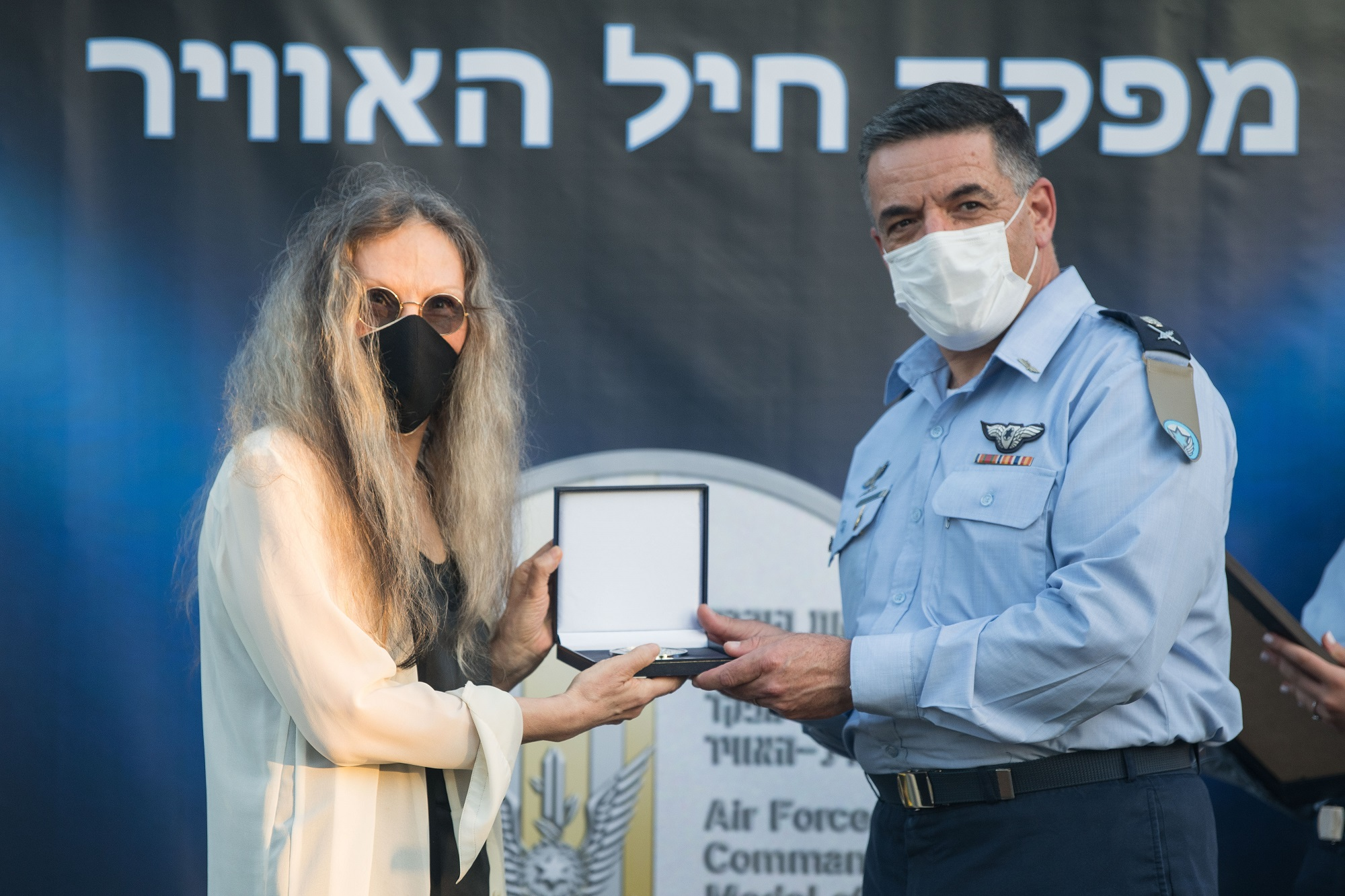 בטקס שנערך ביום א', הוענקו מדליות הוקרה מטעם מפקד חיל-האוויר, אלוף עמיקם נורקין, לארבעה אנשים שעשו ועודם עושים מעל ומעבר עבור החיל - אל"ם (במיל') ראובן אברהם, פרופסור ברכה אטינגר, אל"ם (במיל') ד"ר ו' והרב איציק לסלאו.